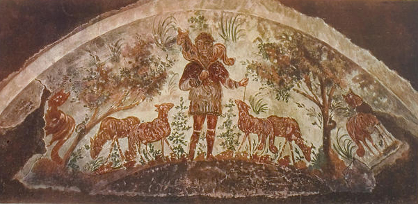 Coemeterium Maius: buon pastore.